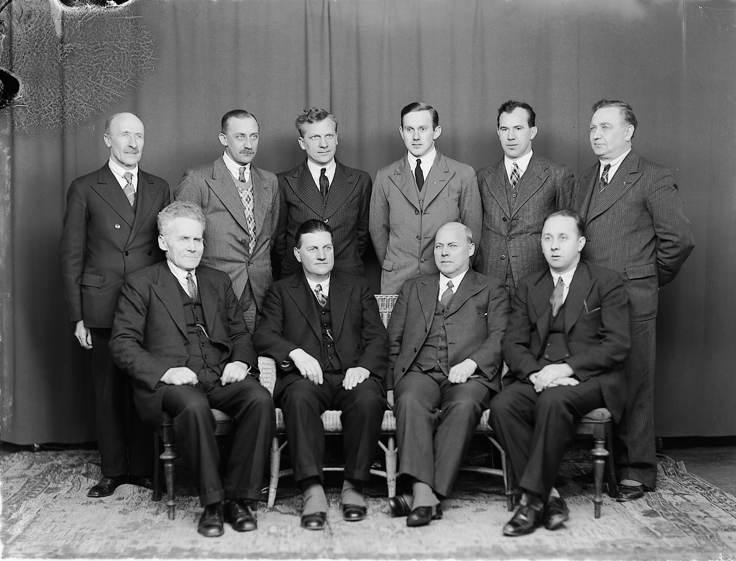 Styret i Hamar Arbeiderblad 1930. Foran f.v.: Knud Kristiansen, Sigurd Pedersen, Fr. Kristian Monsen, Chr. Morseth. Bak f.v.: Karl Amundsen, Karl Petersen, Håkon Hoff, Hans Smedbold, Leiv Hegstad, Ole Mæhlum. Kilde for personer: Hamar Arbeiderblad gjennom 25 år : trekk av Arbeiderpartiets pressehistorie i Hedmark fra 1909